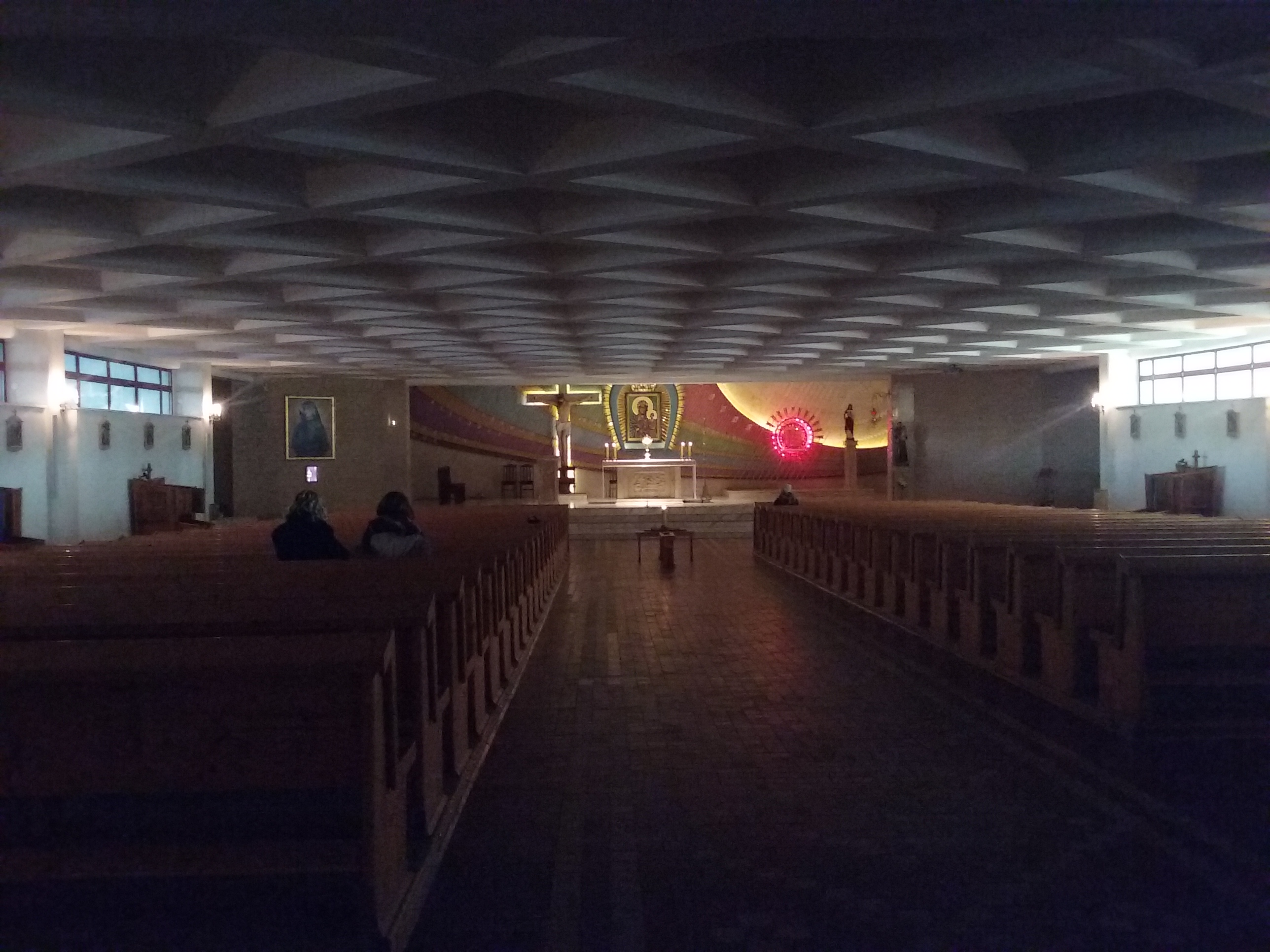 Świątynia dolna kościoła rzymskokatoliskiego przy ul. Słowackiego w Tomaszowie Mazowieckim